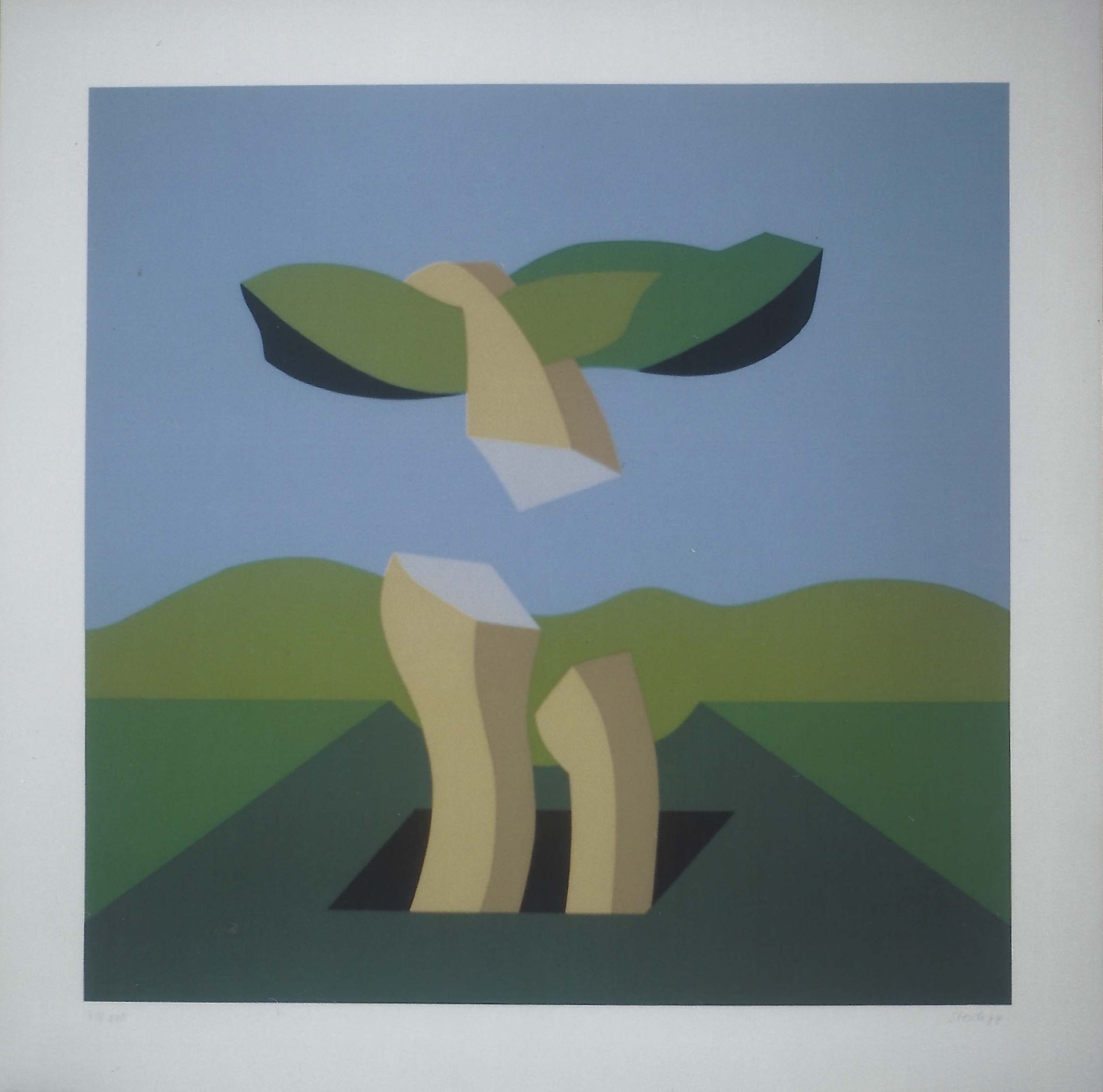 Serigraphie von Ursula Stock, 50 x 50 cm, 1974.